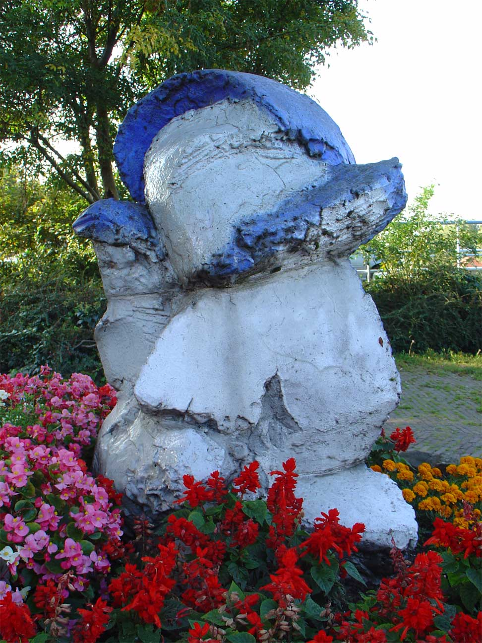 Zonder titel (1990), keramiek, door David Vandekop (1937-1994) - Wachtelstraat/Turfsingel te Gouda)